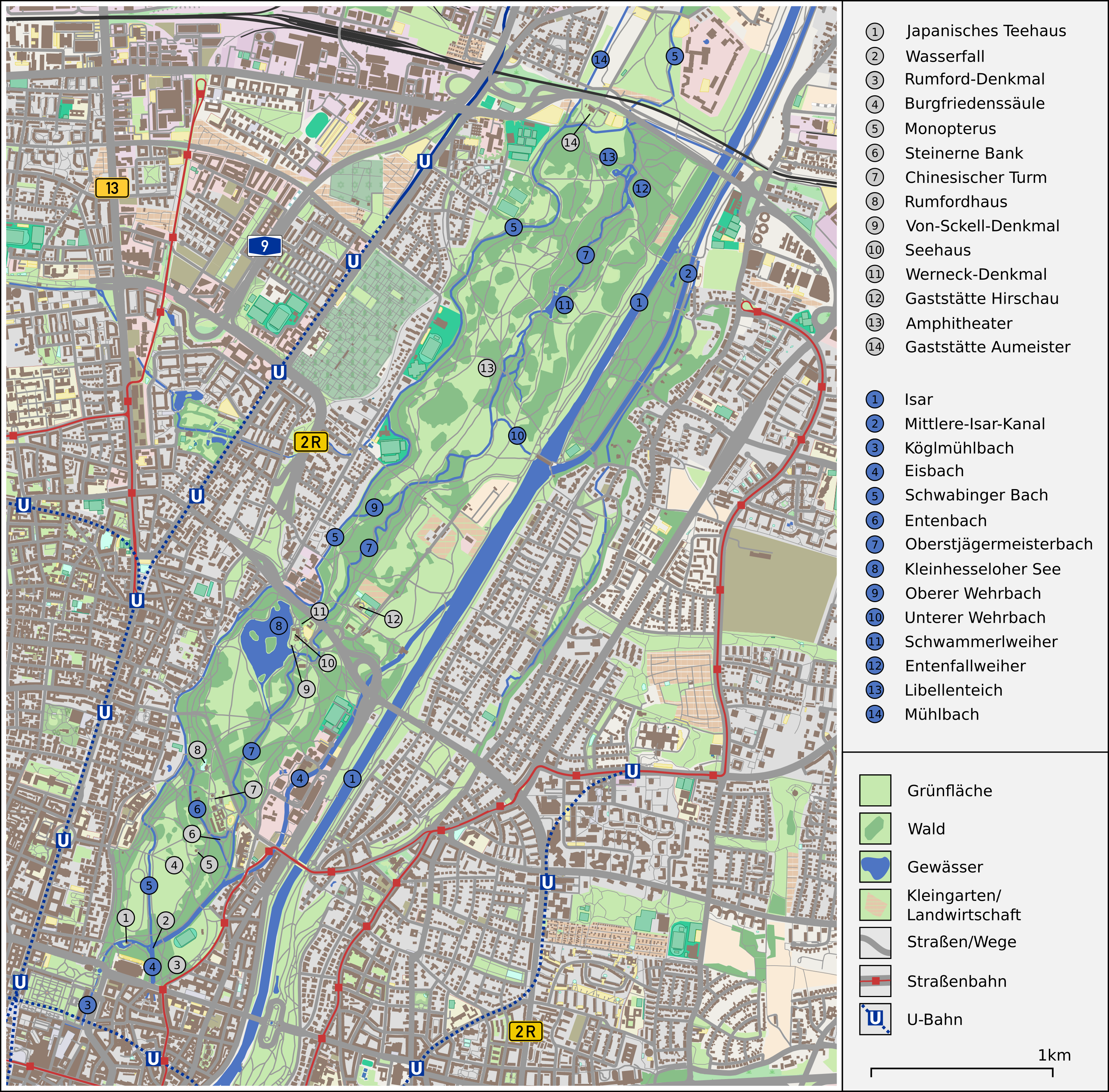 Karte des Englischen Gartens in München This map may be incomplete, and may contain errors. Don't rely solely on it for navigation.